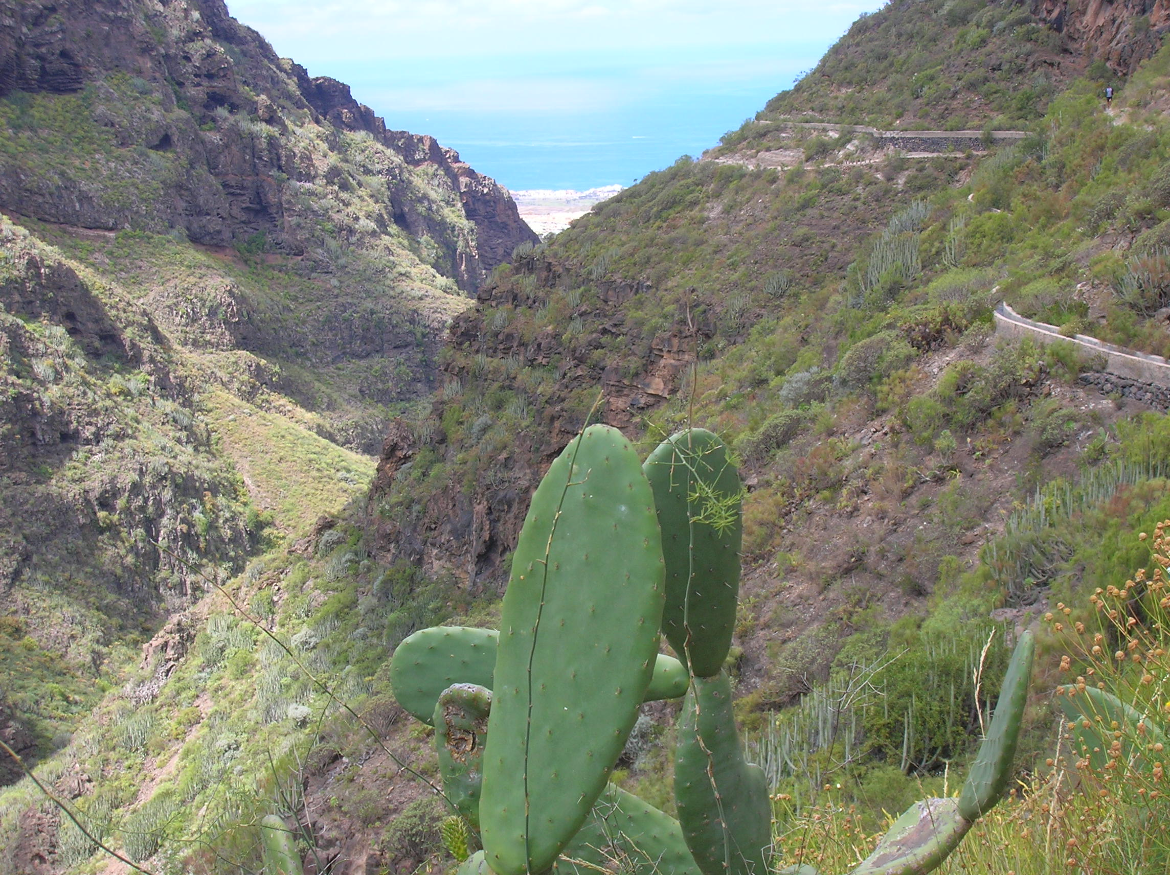 Barranco del Infierno, Tenerife